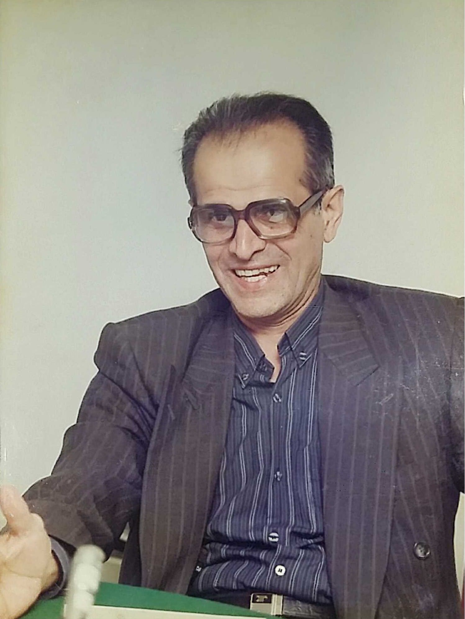 سید جعفر مهرداد در مصاحبه با احمد آرام